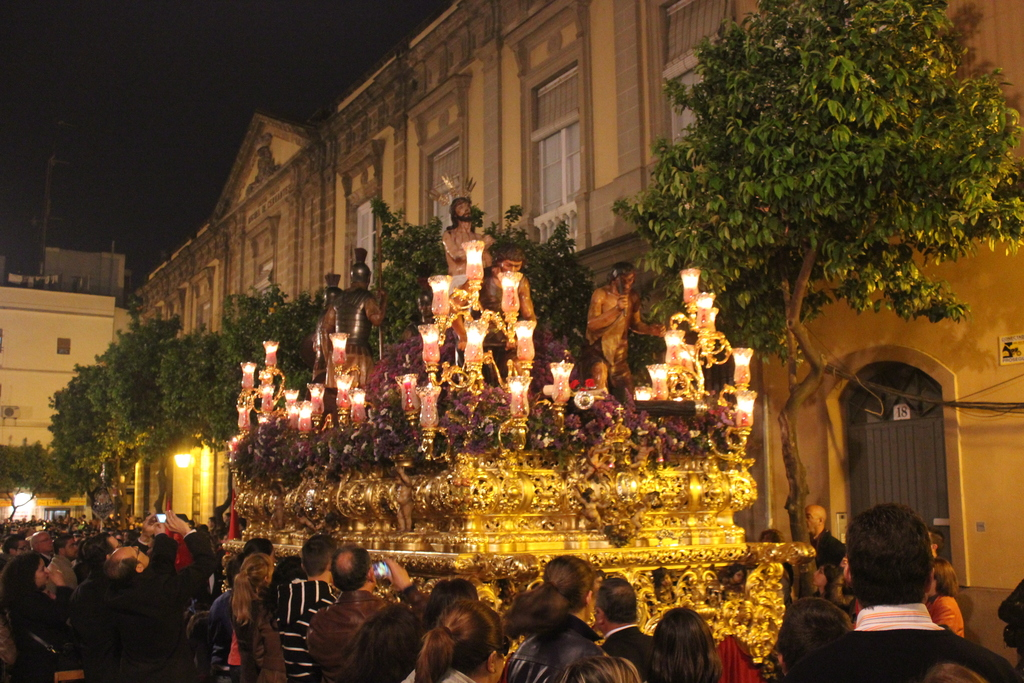 Los Judíos de San Mateo. Semana Santa 2012 Jerez de la Frontera (Andalucía, España)